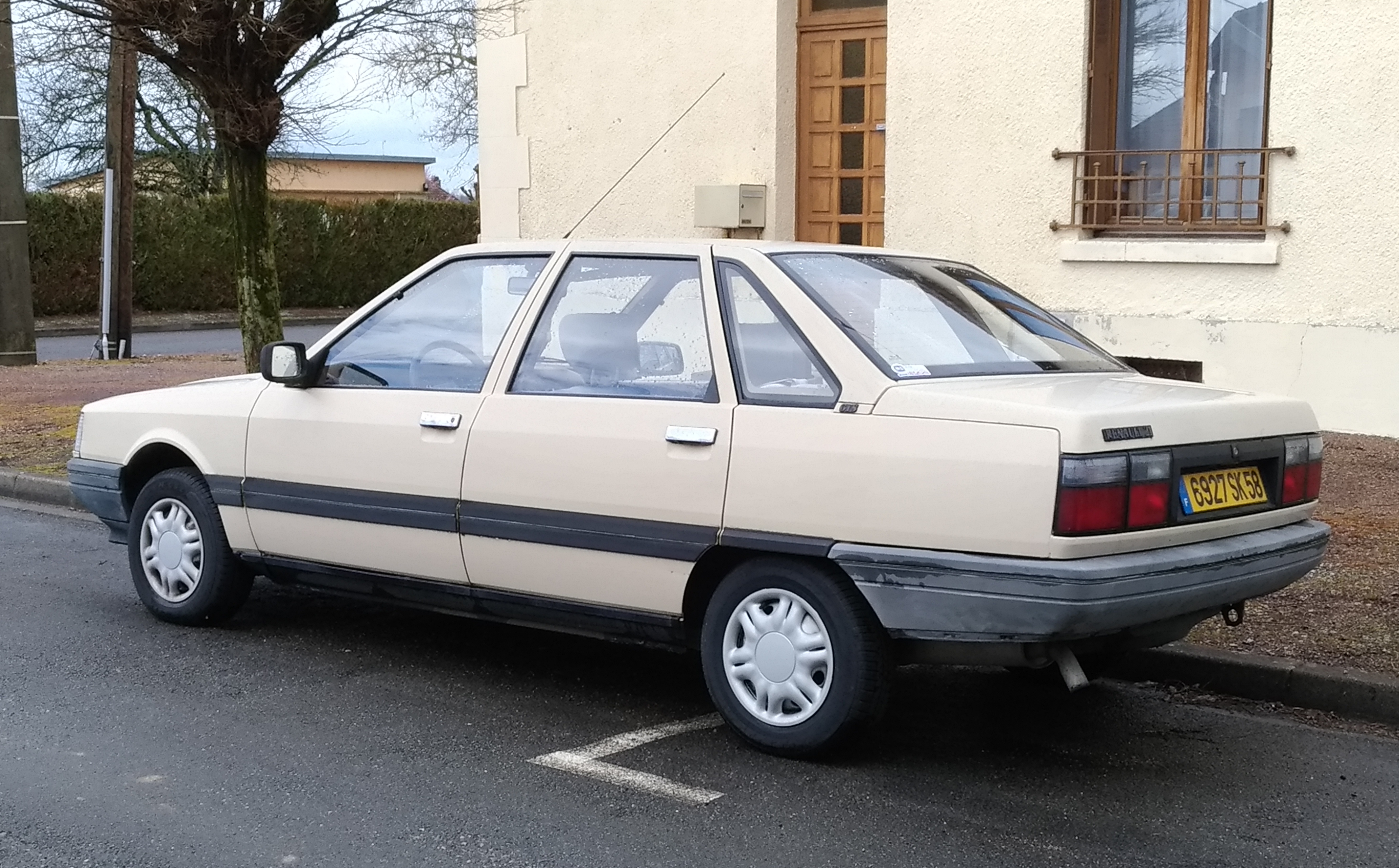 1987 Renault 21 GTS (1.7 88 hp) at Nevers